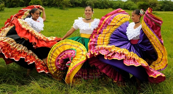 Traje Típico de la Provincia de Guanacaste, Costa Rica